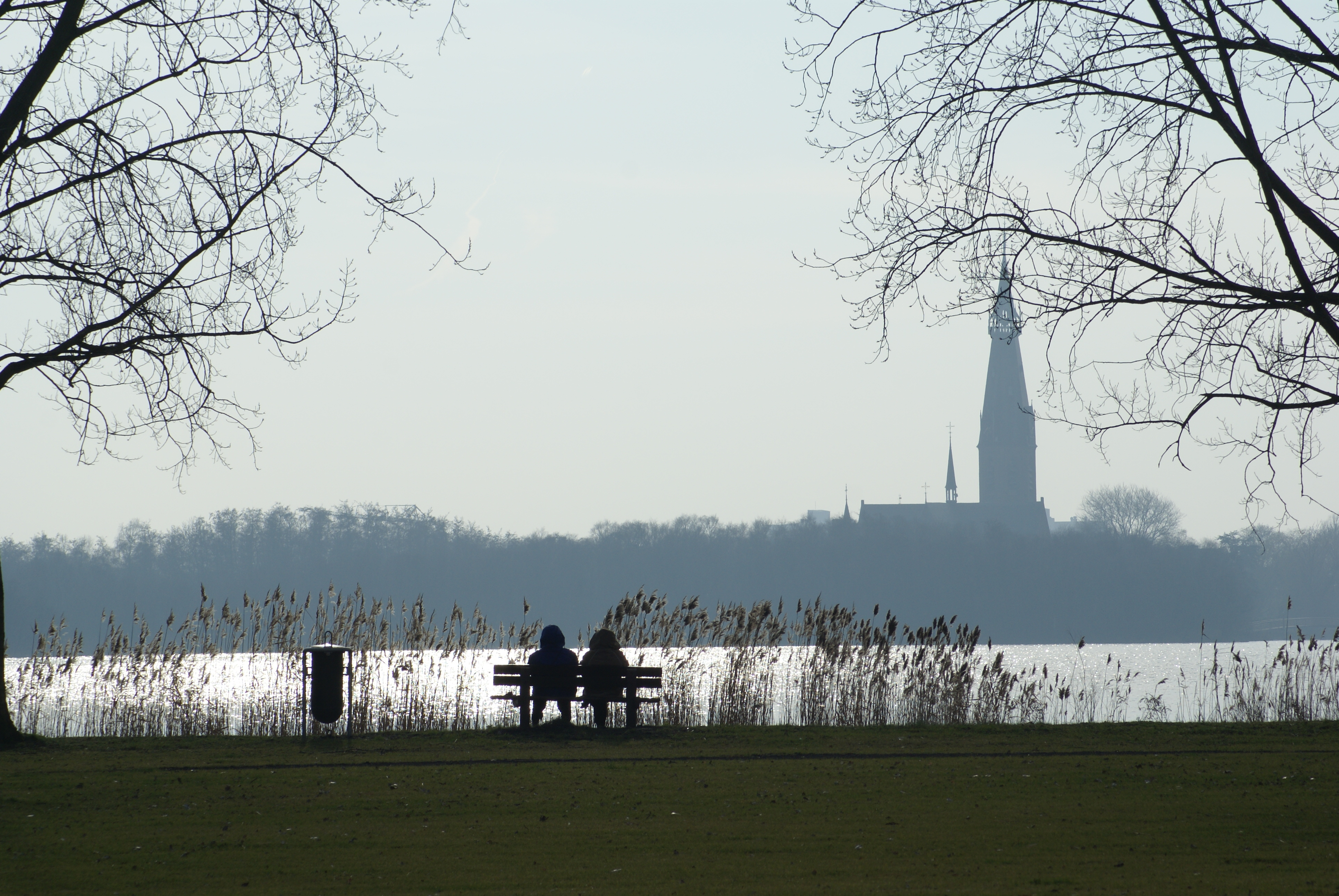 Twee mensen zitten op een bankje aan de Poel in Amstelveen. Op de achtergrond het silhouet van de St. Urbanuskerk in Bovenkerk.